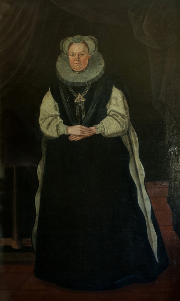 Sophia av Slesvig-Holsten-Gottorp